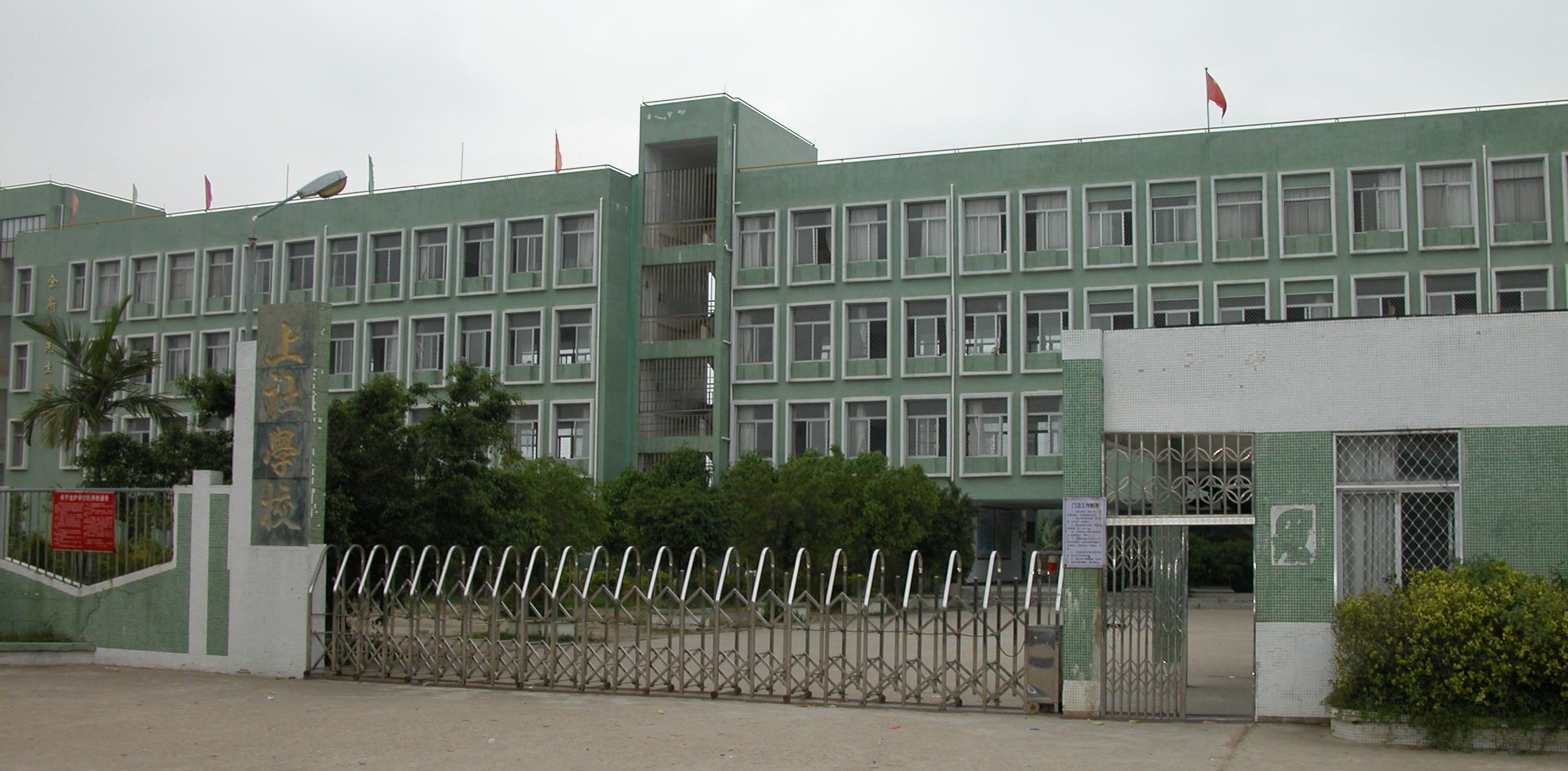 汕头盐灶上社小学